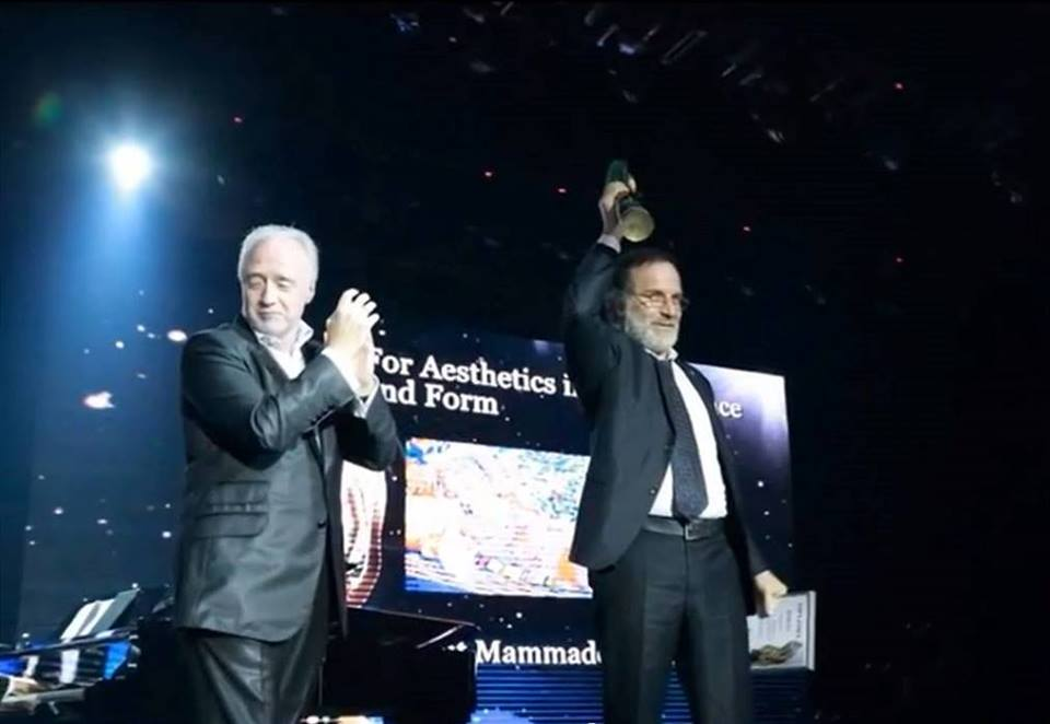 Sakit Məmmədov Vera Mükafatı ilə